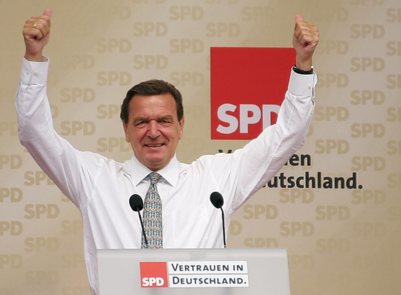 Bundeskanzler Gerhard Schröder bei einer Wahlkampfkundgebung der SPD am Münchner Marienplatz rund eine Woche vor der Bundestagswahl